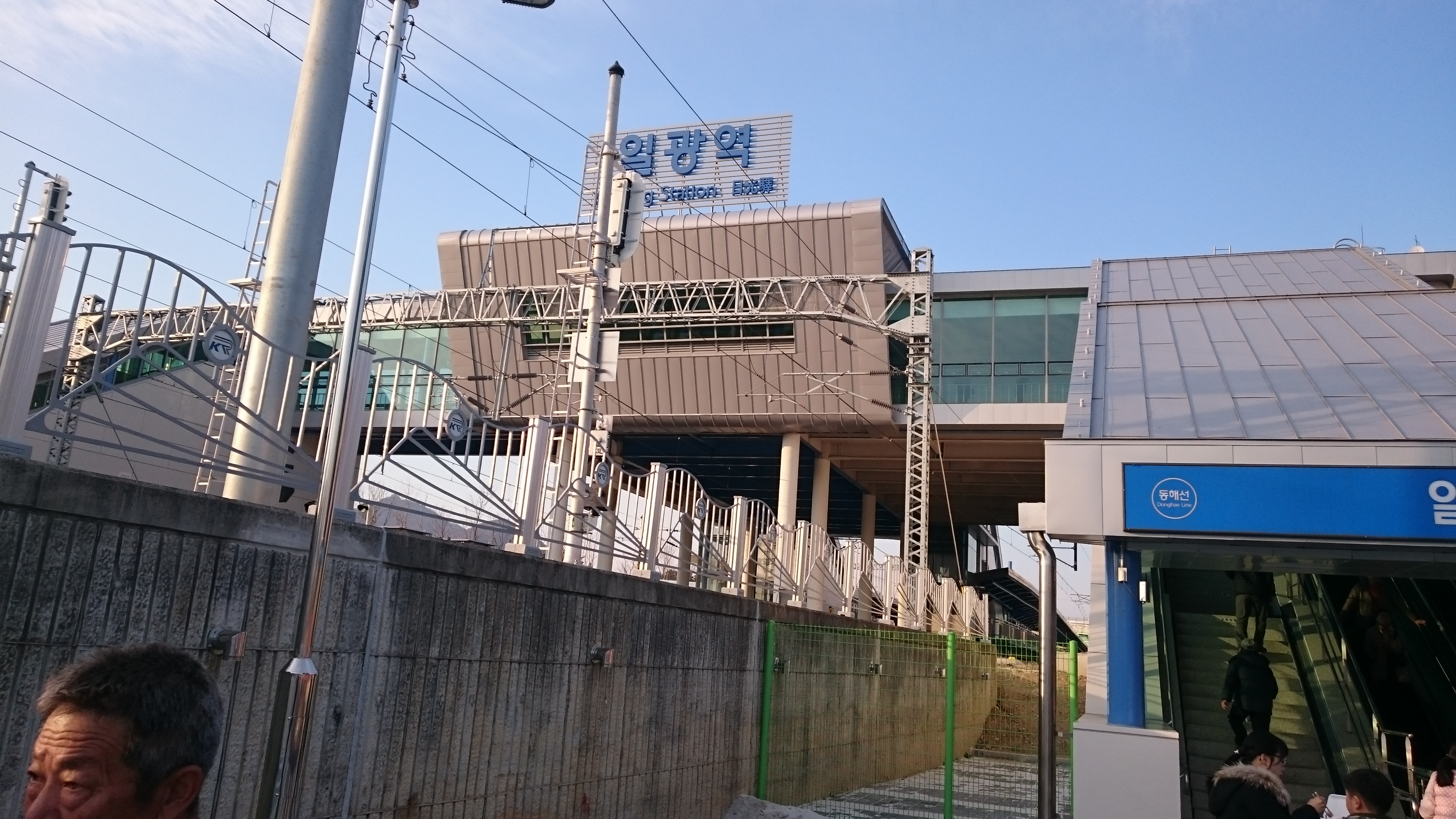 東海線日光駅全景。